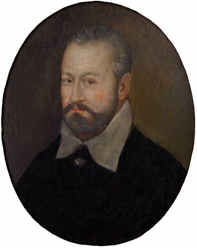 Montaigne vers 1565, portrait anonyme.